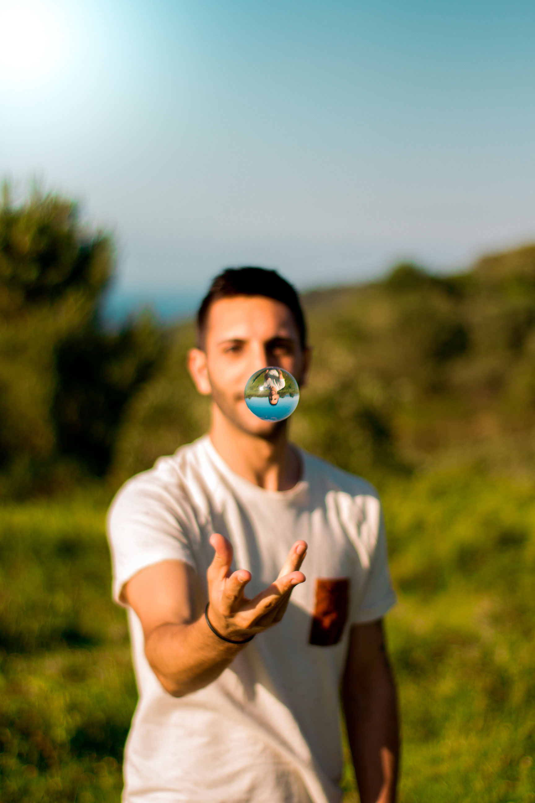 Fotografía editada con Adobe lightroom